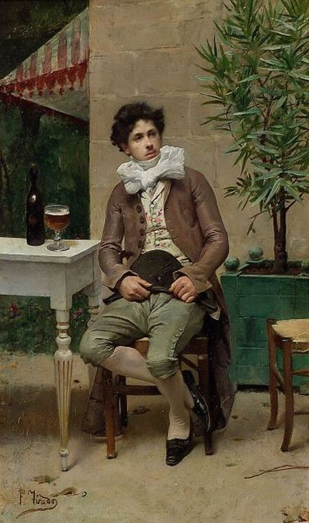 Tomando un aperitivo por Fernando Tirado (1862-1907), óleo (33 x 20 cm)